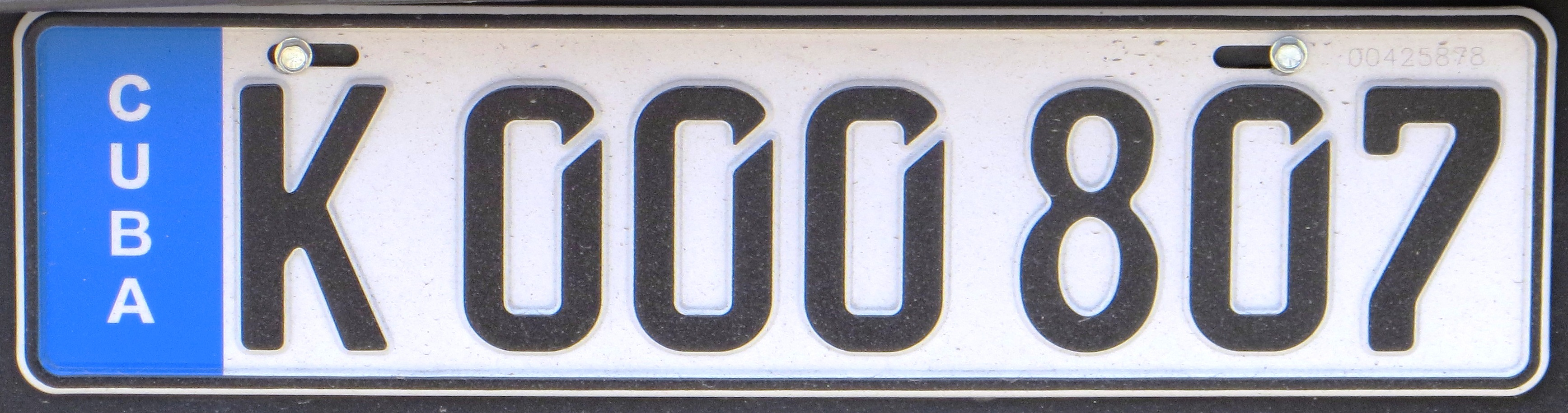 Kentekenplaat uit Cuba